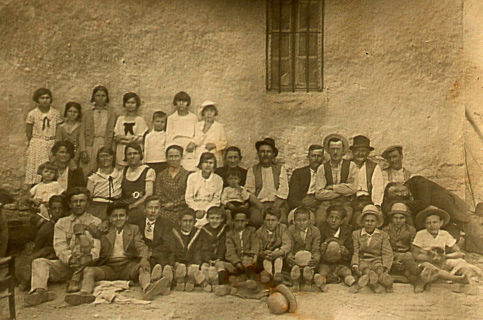 Photo prise après la messe à Caseneuve en 1930